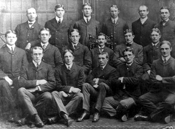 1902 Pittsburgh Pirates